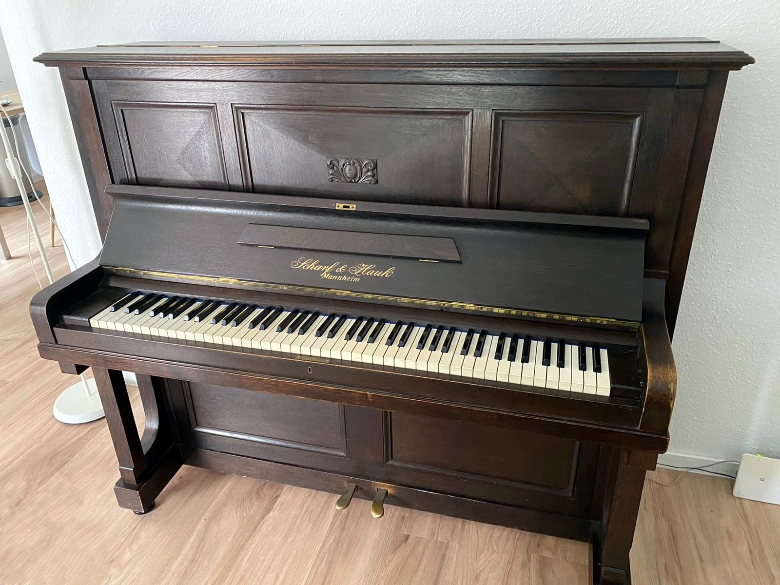 Ein Klavier der Mannheimer Fa. Scharf & Hauk, frühes 20. Jahrhundert.